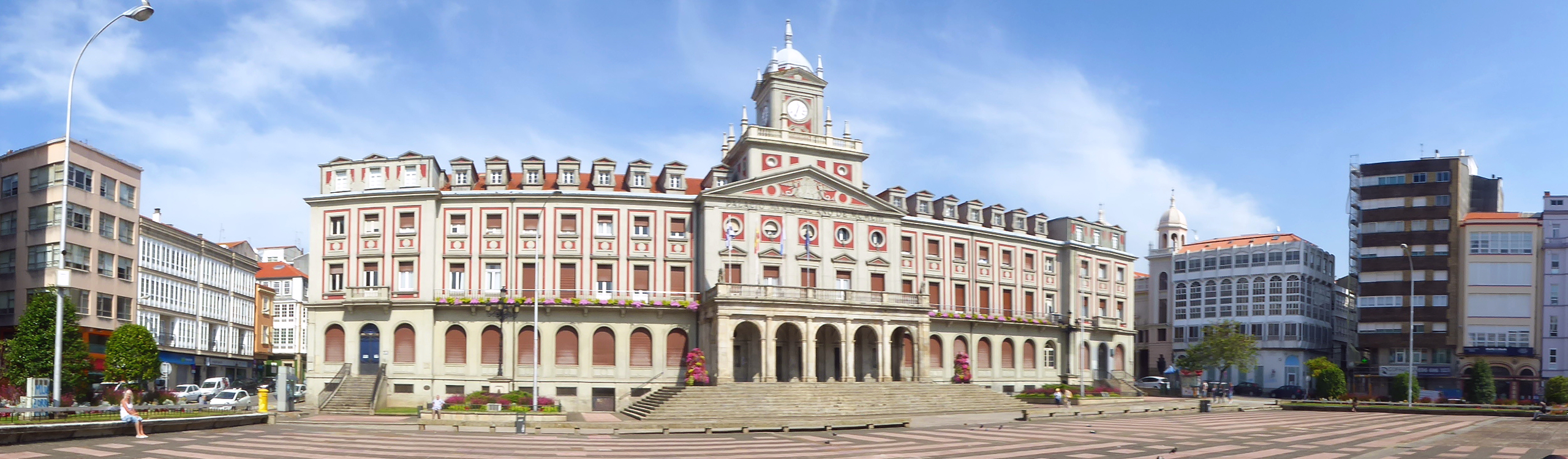 Casa do Concello (1953) Palacio Municipal (Ayuntamiento), Rathaus an der Plaza de Armas in Ferroll in Galicien Spanien Foto Wolfgang Pehlemann P1060277